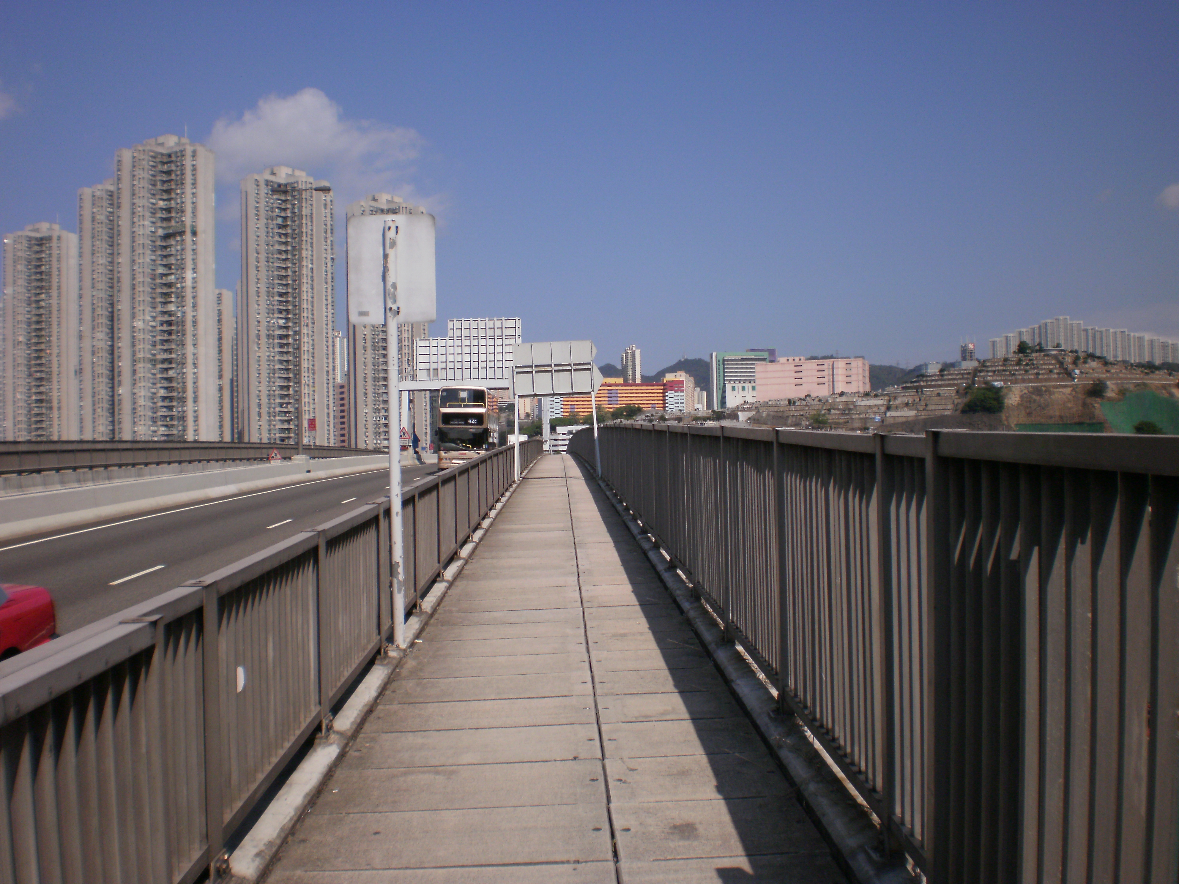 中文（香港）: 青荃橋上的行人路